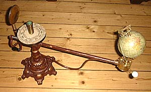 Tellurium.